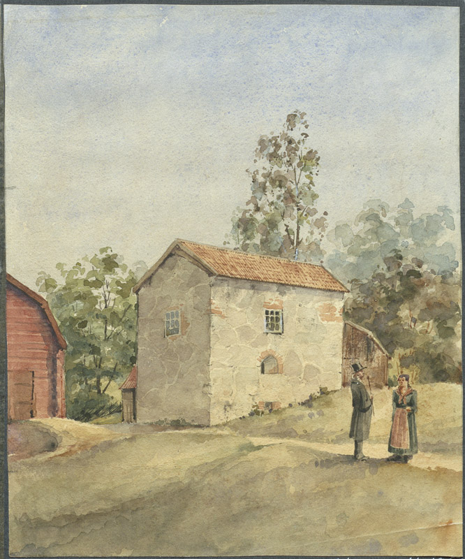 Medeltida stenbyggnad nära Forsa kyrka. Akvarell av Agi Lindegren från 1880. Motiv: Forsa 83:1 Kategori: Akvarell, Byggnad annan Medeltida stenbyggnad nära Forsa kyrka. Akvarell av Agi Lindegren från 1880. Forsa 83:1.